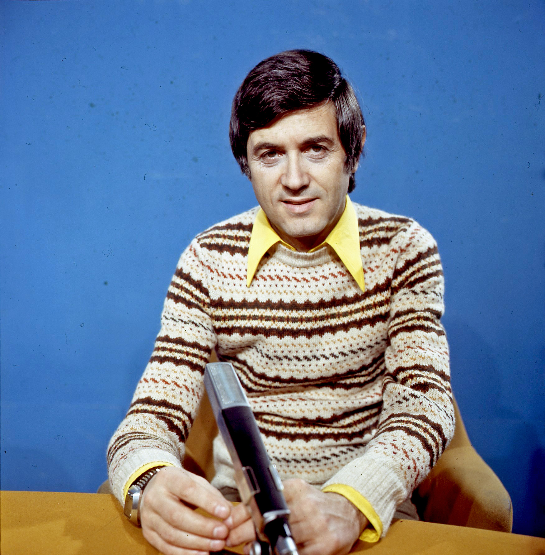 Марко Марковић(1935-2011)спортски новинар.Фото Стеван Крагујевић (по одобрењу кћерке Тање Крагујевић)